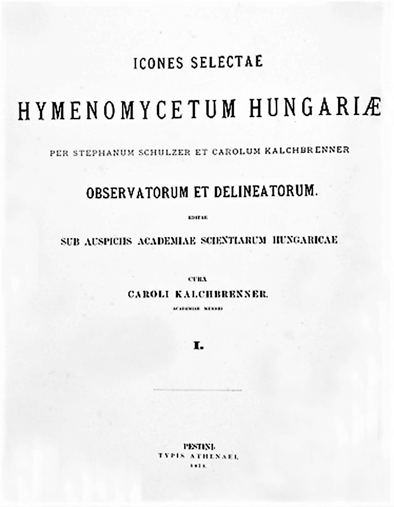 Karl Kalchbrenner & Stephan Schulzer von Müggenburg: „Icones selectae Hymenomycetum Hungariae”, 1. Band, Titelseite, Verlag „Athenaei al „Magyar Tudományos Akadémia”, Budapest 1873